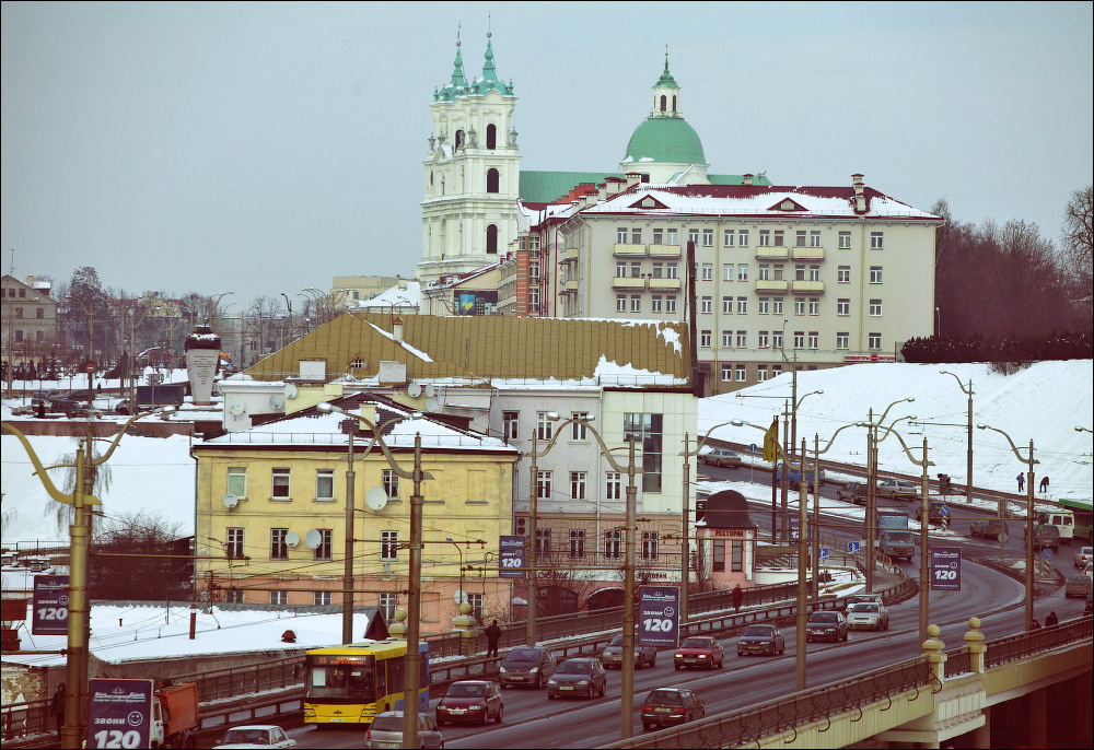 Гродзенскія замалёўкі